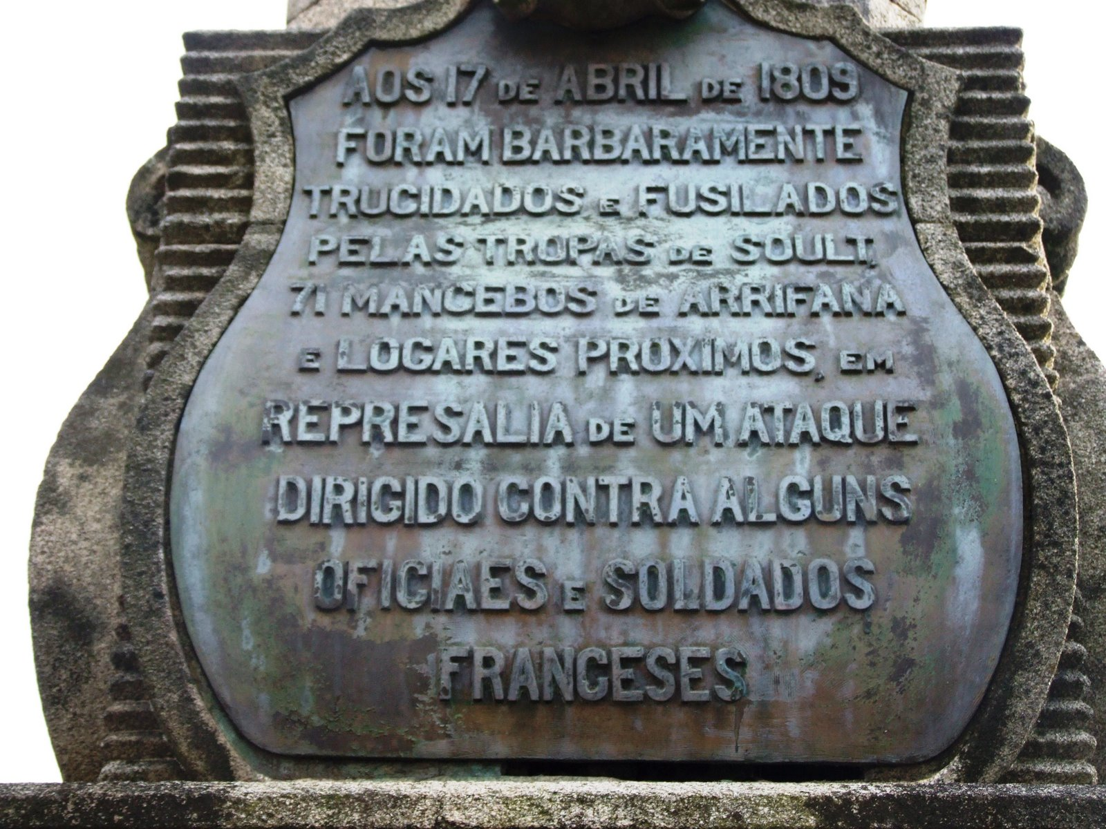 Invasões Francesas